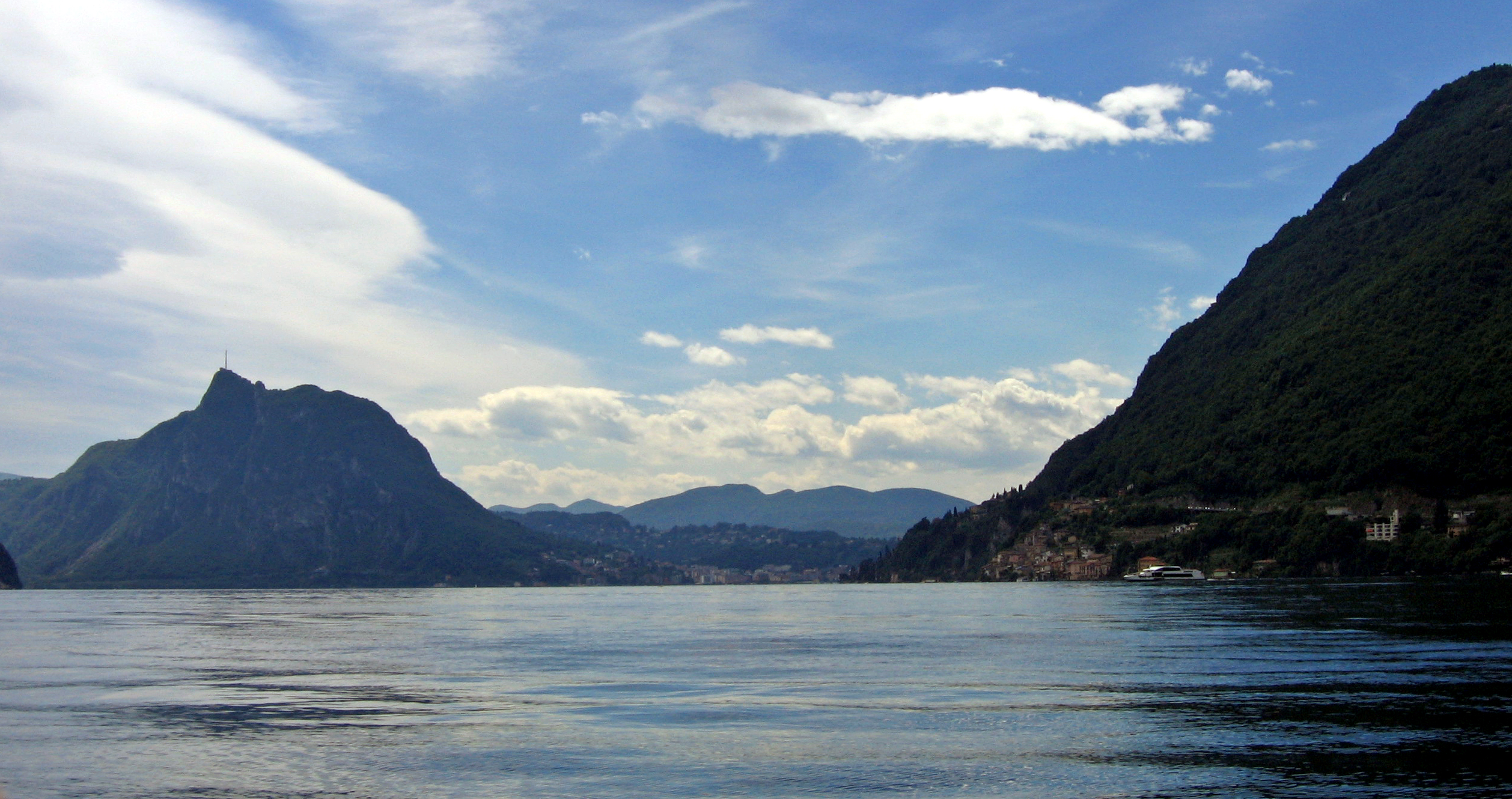 Lago di Lugano